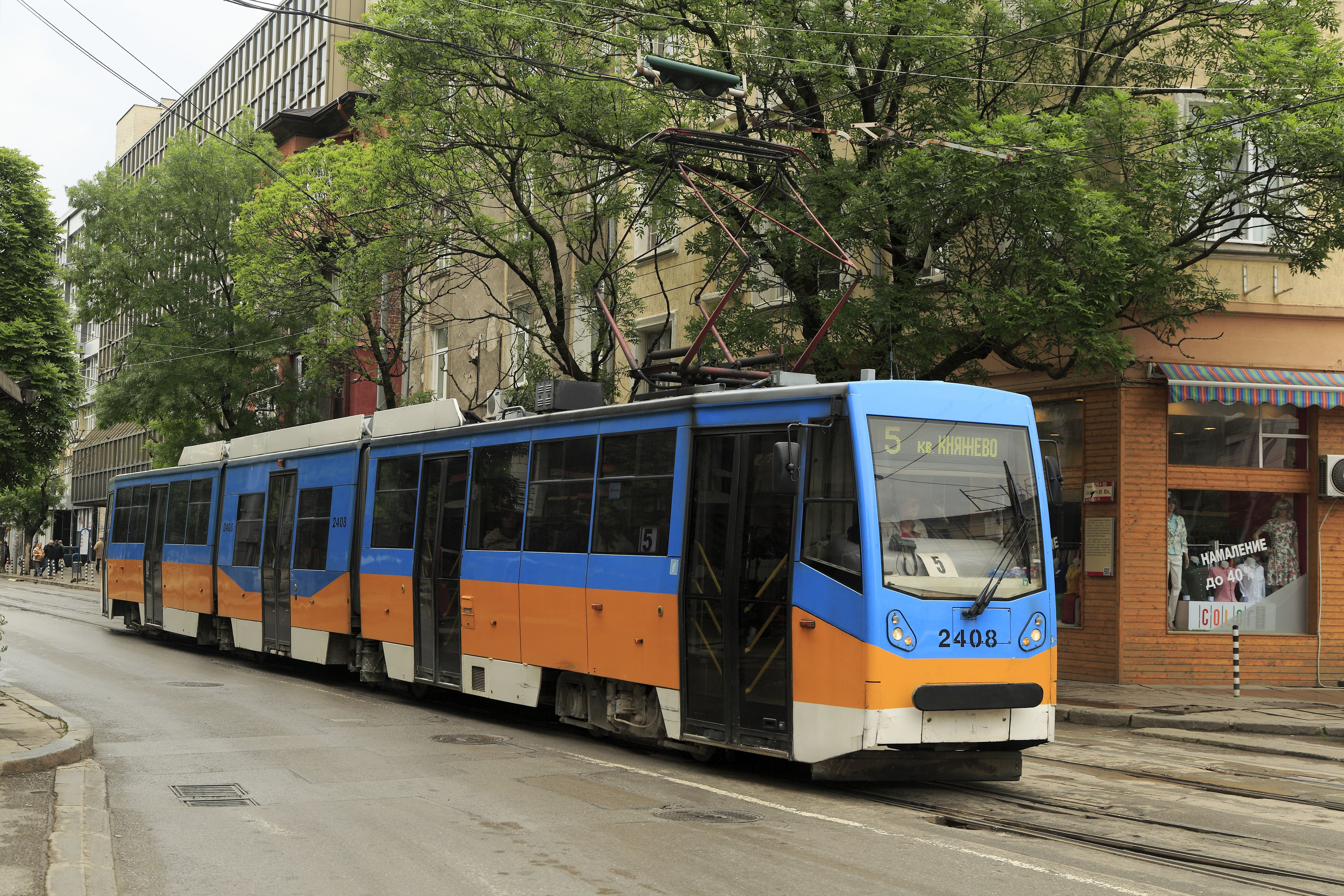 Zug der Linie 5 nach Knjaževo vor dem Ploščad Makedonija, die Wagen der Bauart T8M-700IT Inekon wurden erst 2008 und 2009 gebaut.